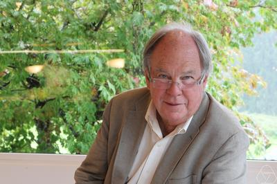 Foto di Alan Huckleberry